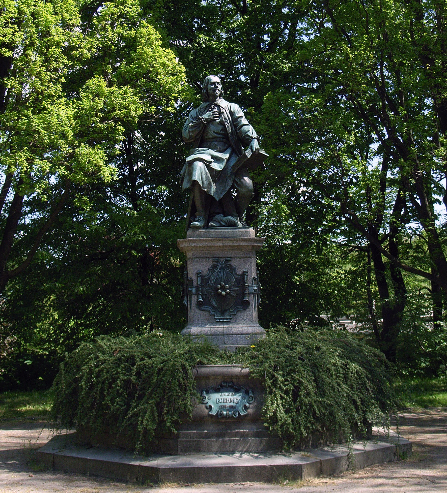 Jakob Böhme-Statue/Brunnen in Görlitz von Johannes Pfuhl, gegossen wurde das Werk 1898 in der Eisengießerei Lauchhammer, und am 31. 10. 1898 enthüllte man es